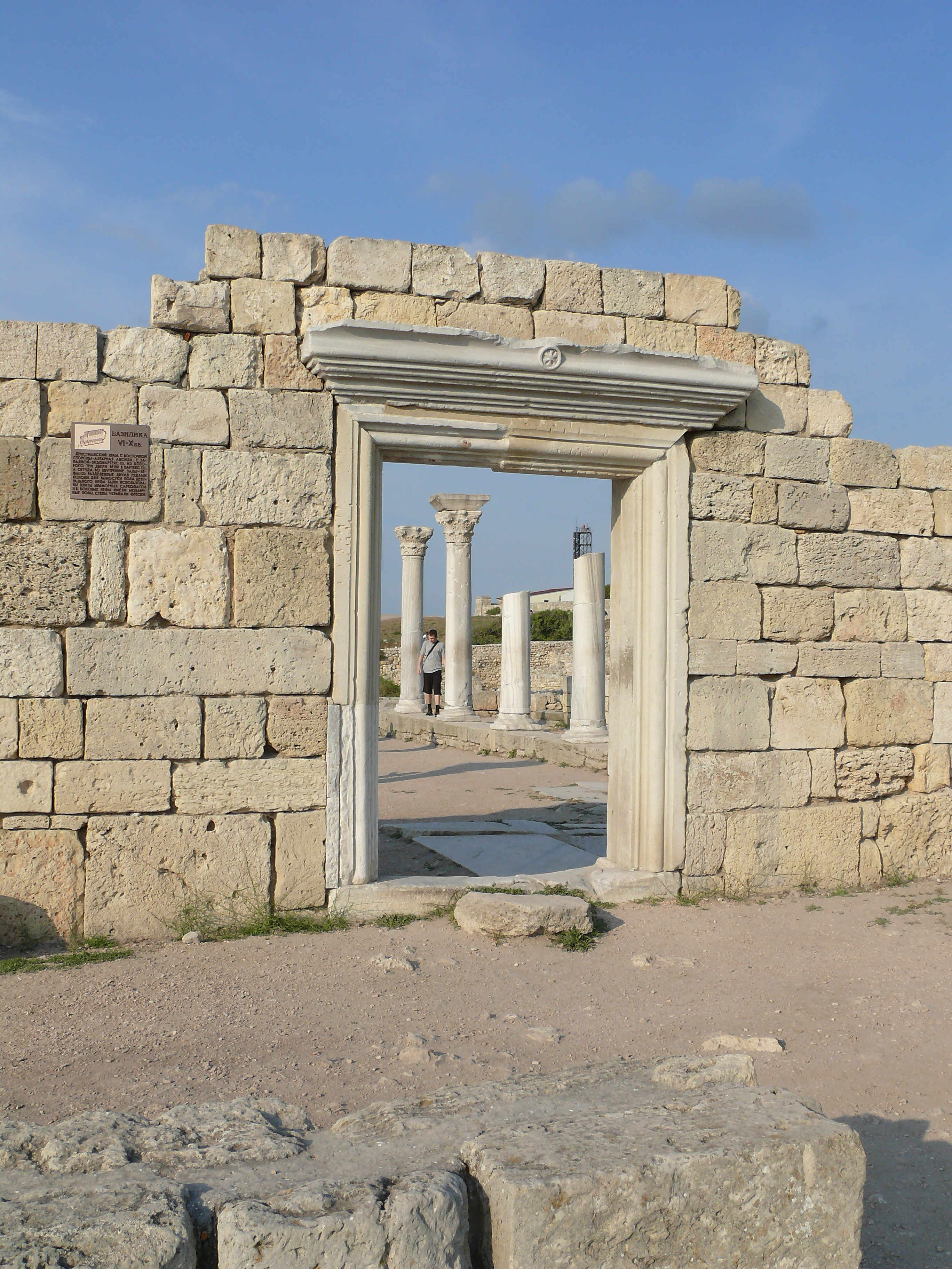 Комплекс "Стародавнє місто Херсонес-Таврійський", Севастополь, вул. Древня, 1